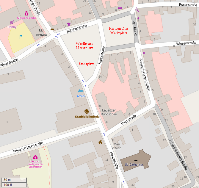 Kartengrafik der Elsterwerdaer Innenstadt im Bereich um den Marktplatz